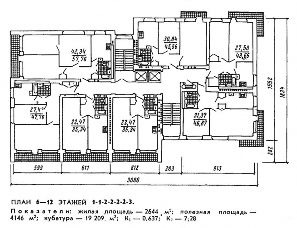 Типовая планировка серии зданий планировки щ-5416